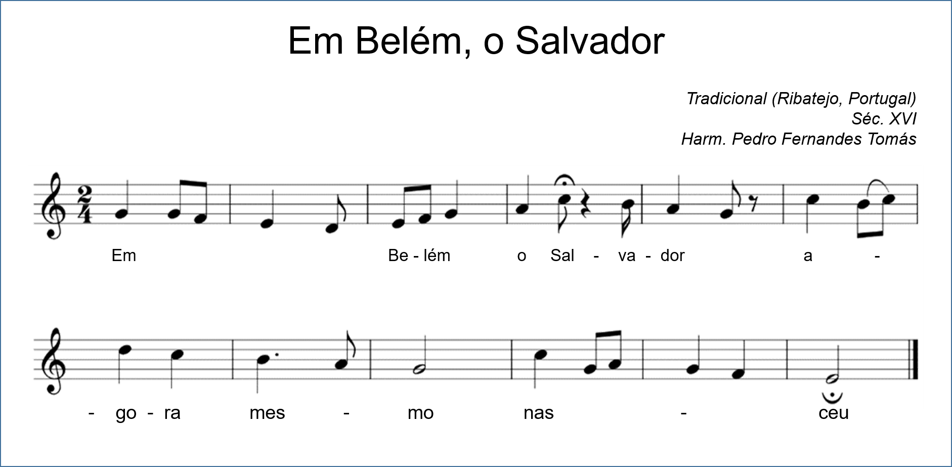 "Em Belém, o Salvador", canção de Natal tradicional portuguesa do Ribatejo. Adaptada de Cantares do Povo de Pedro Fernandes Tomás.